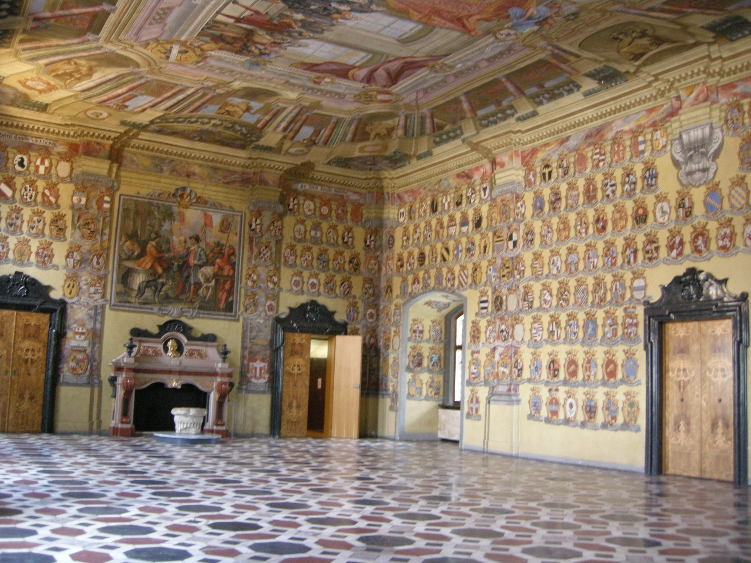 Landhaus Klagenfurt, Wappensaal